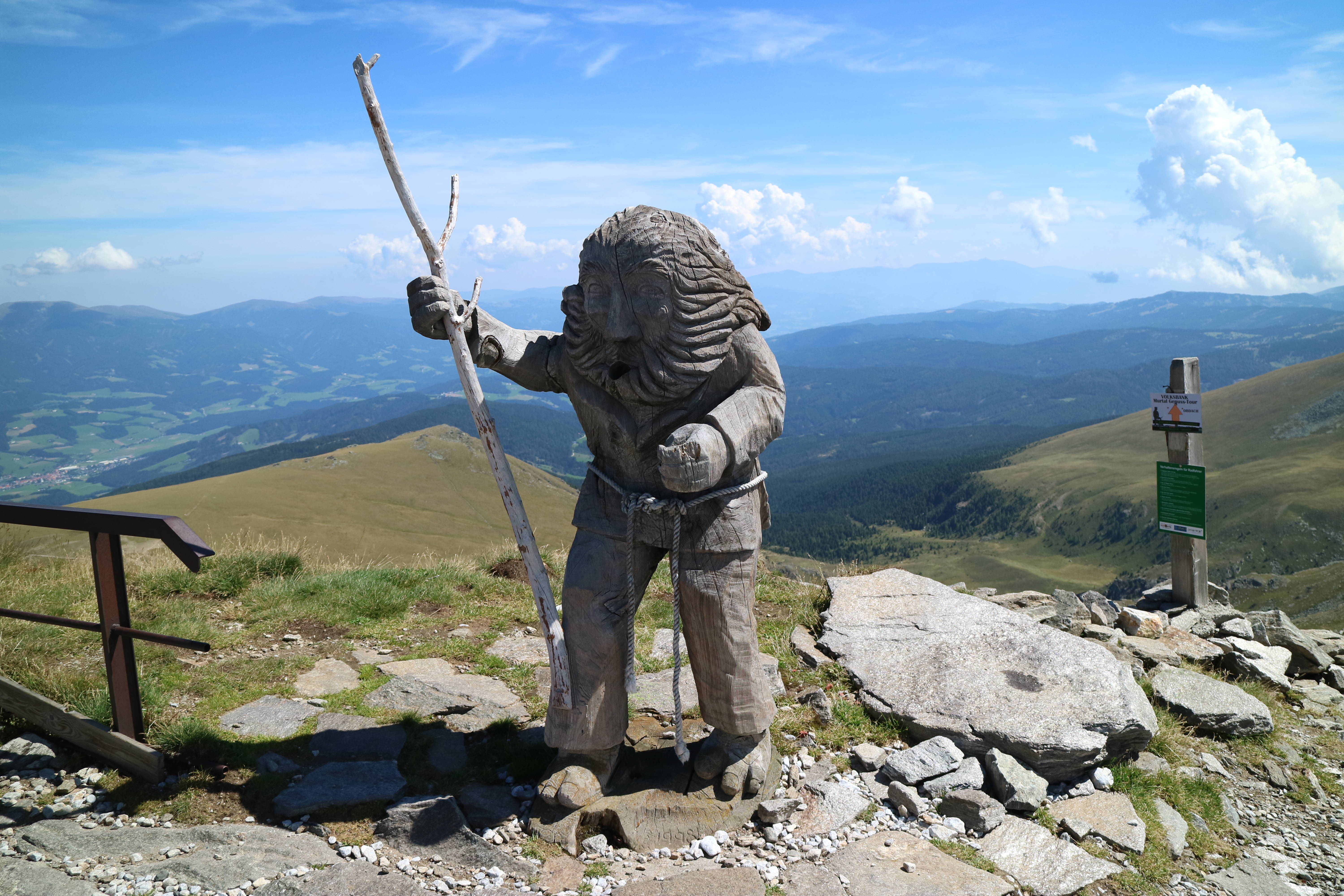 Hölzerner Zirbengeist beim Zirbitzkogel Schutzhaus